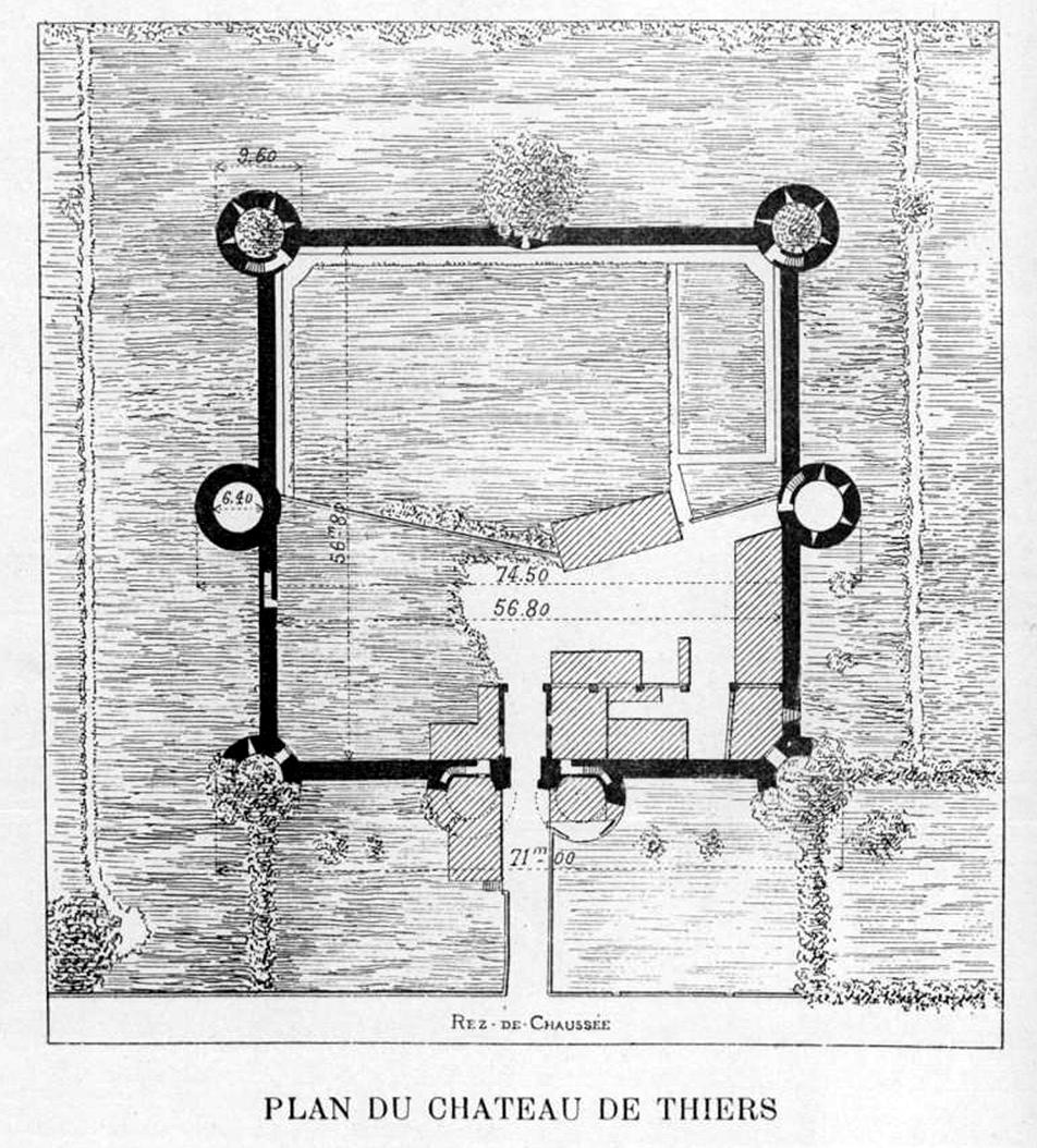 Plan du château de Thiers-sur-Théve, situation à la fin du XIXe siècle.